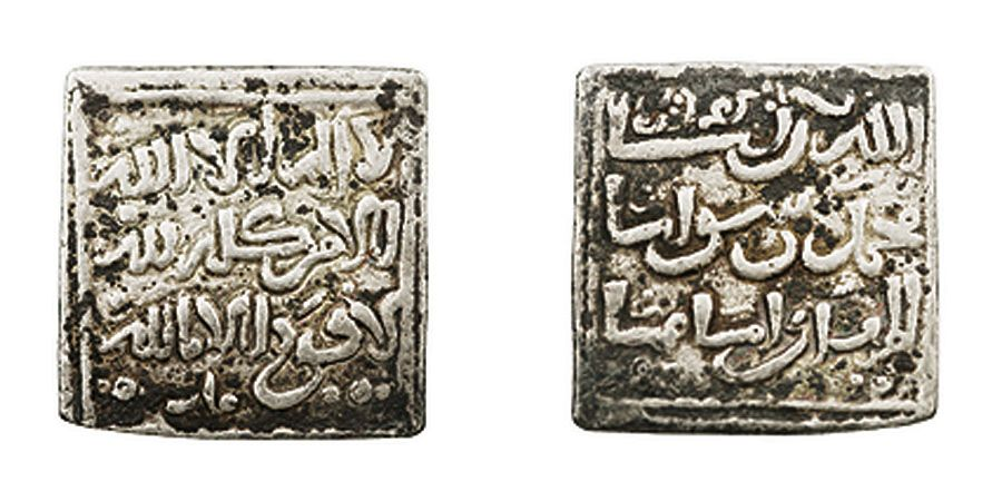 Dírham almohade anònim, emès a Fes. En plata